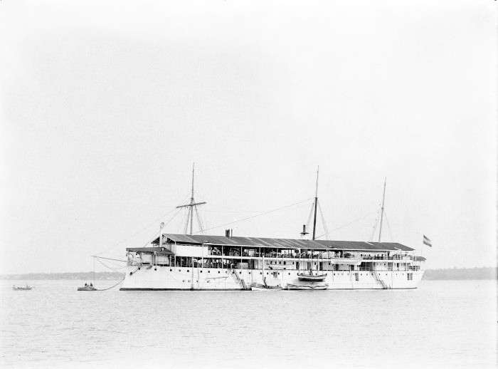 Negatief. Het gepantserde marineschip Zr. Ms. Koning der Nederlanden